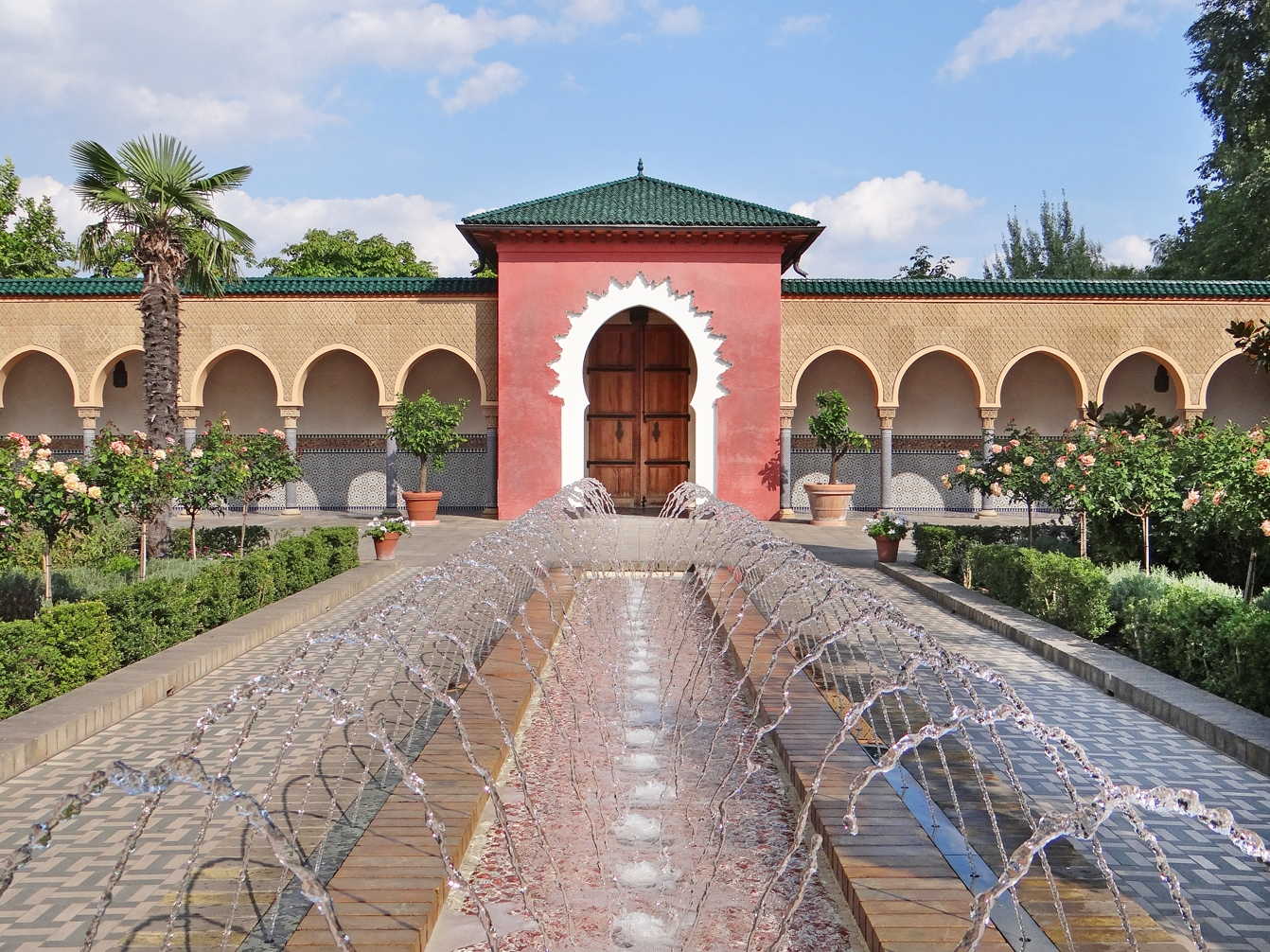 Ouvert en juillet 2005, dans le parc des jardins du monde de Marzahn, à la périphérie de Berlin, ce jardin, organisé sous forme d'un Riyâd, intègre les traditions de plusieurs pays de l'Islam. Il a été conçu par Kamel Louafi, un architecte berlinois spécialisé dans ce domaine, avec les conseils du Prof. Mohammed El Fai'z de Marrakesh. L'Alhambra, les jardins du Generalife (photo dalbera)